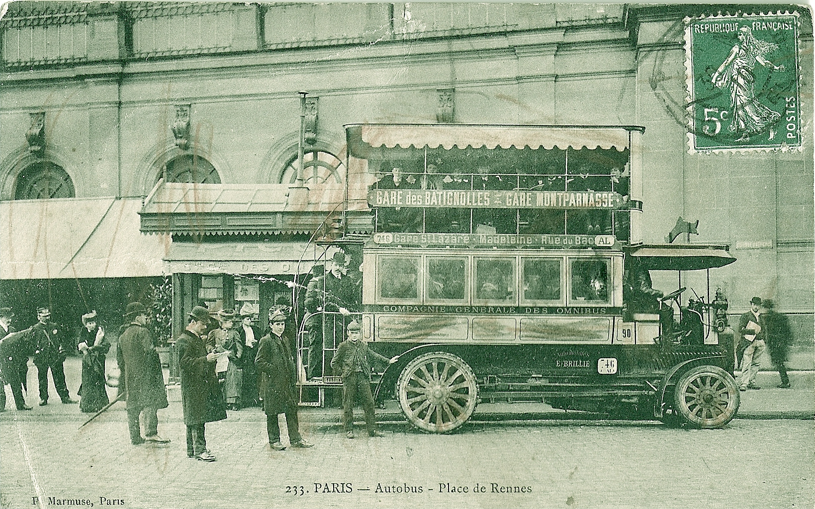 carte postale ancienne éditée par Marmuse, N° 233Paris - Autobus - Place de Rennes (aujourd'hui : place du 18 juin 1940)Vue d'un autobus Brillié-Schneider P2 de la Compagnie générale des omnibus ancêtre de la RATP